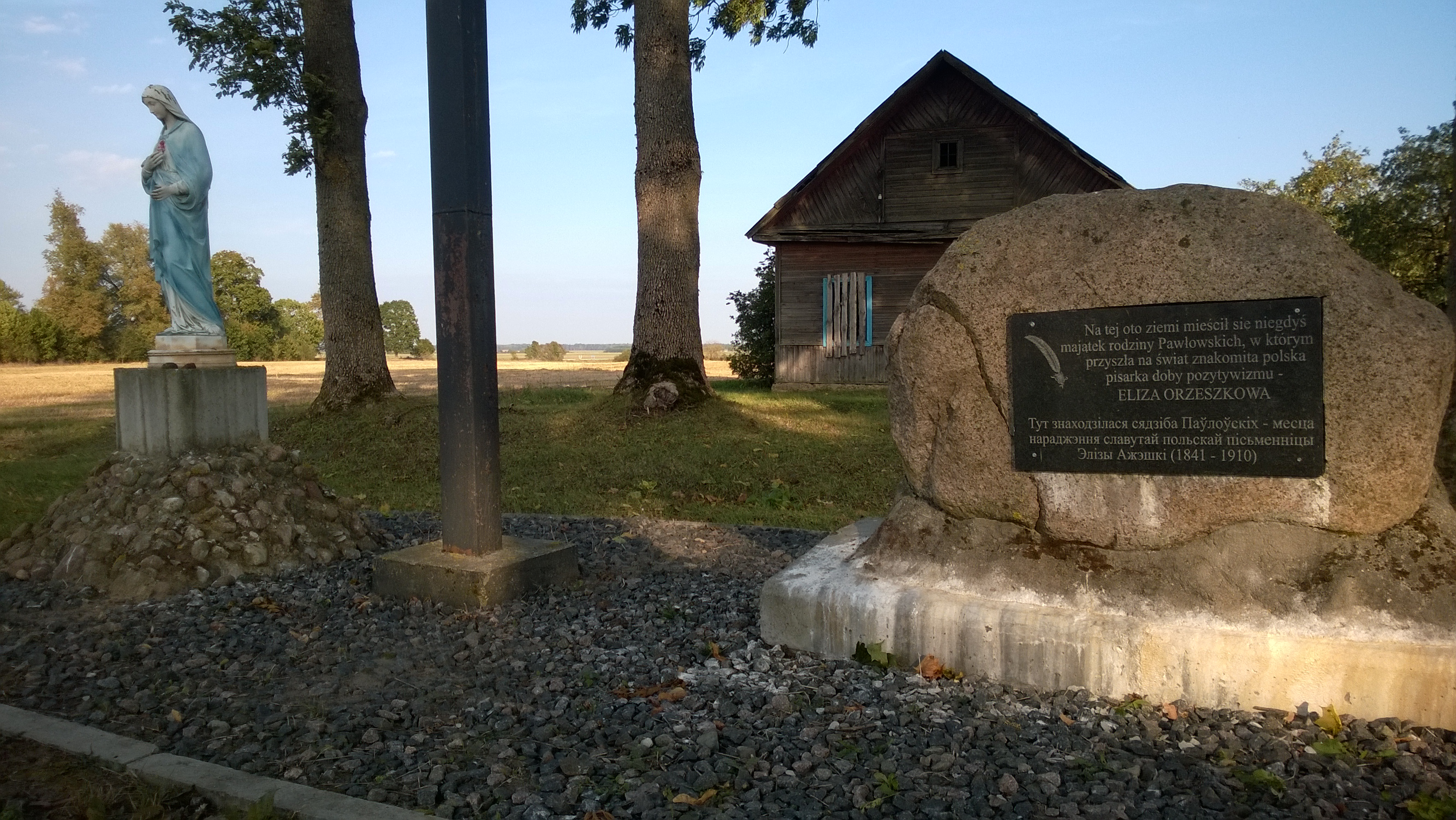 Grodna District, Belarus